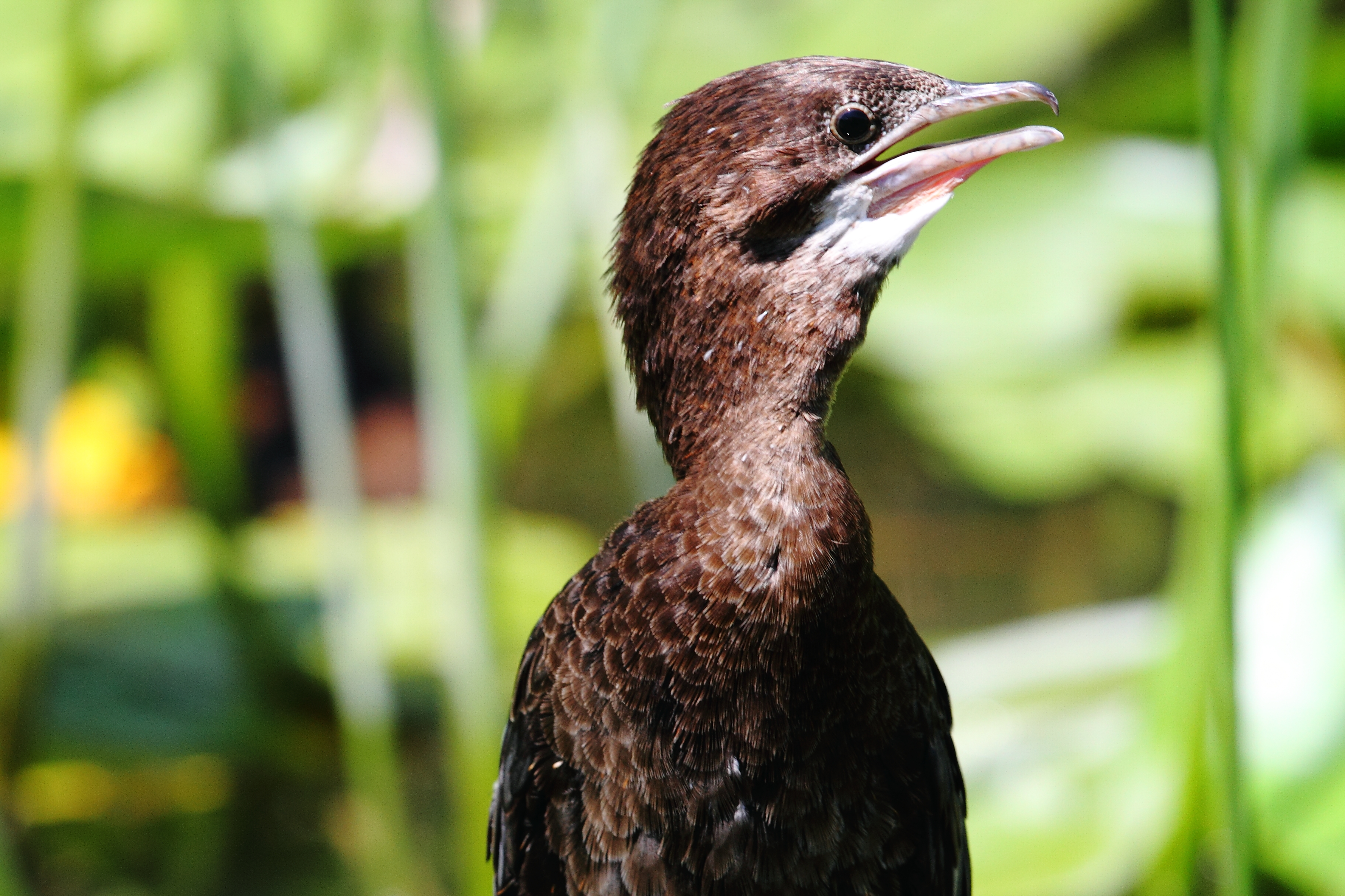 Kormoran mały Phalacrocorax pygmeus